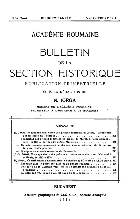 Académie roumaine, Bulletin de la section historique, publié en octobre 1914. Extrait du PDF.